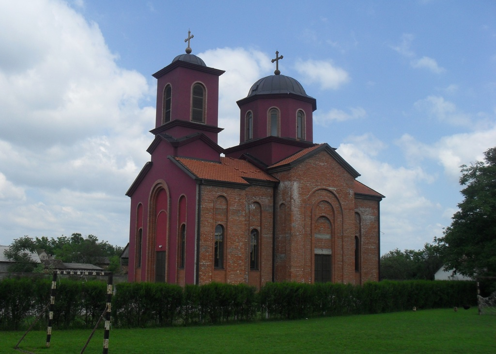 Храм СПЦ Св. краља Стефана Дечанског, Белотић, Мачва, Србија. Храм је у изградњи.